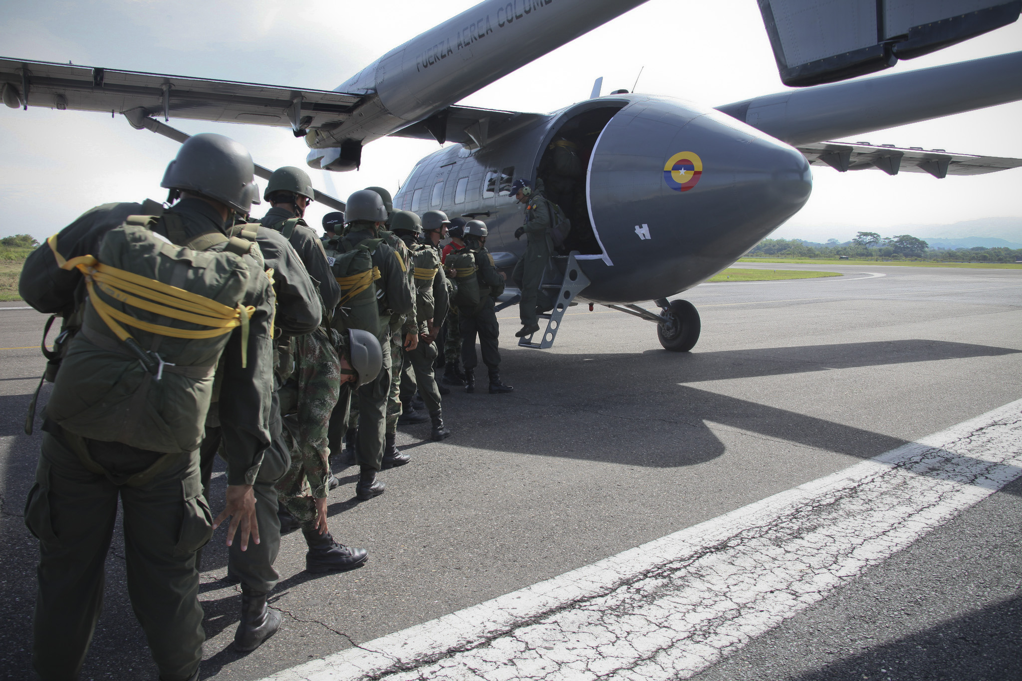 En el Centro de Instrucción Militar de la Fuerza Área Colombiana (CIMIL), en Puerto Salgar, Cundinamarca, fueron entrenados 50 Comandos Jungla de la Dirección de Antinarcóticos en Paracaidismo Militar